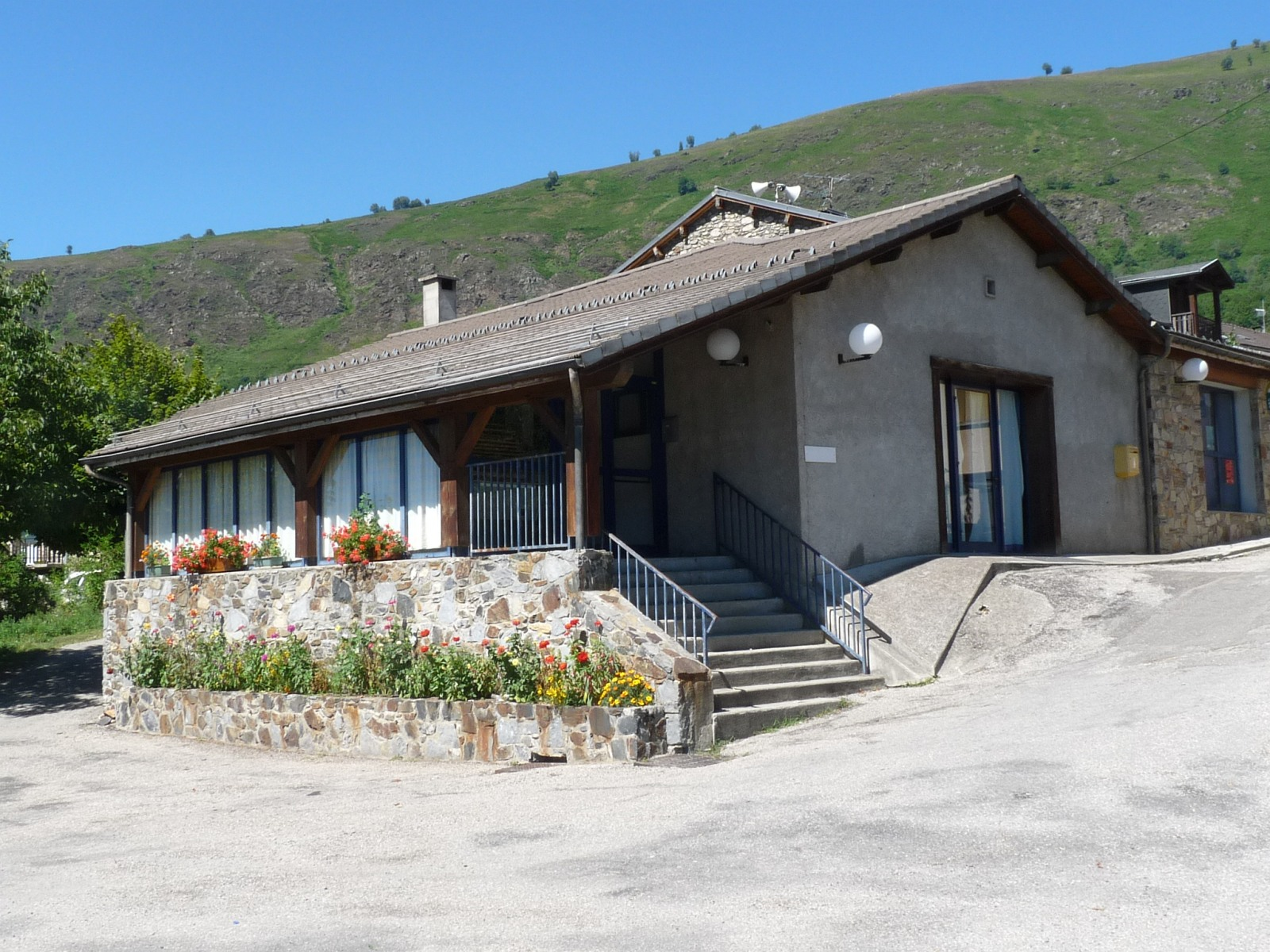 Salle des fêtes de Sorgeat, Ariège, France